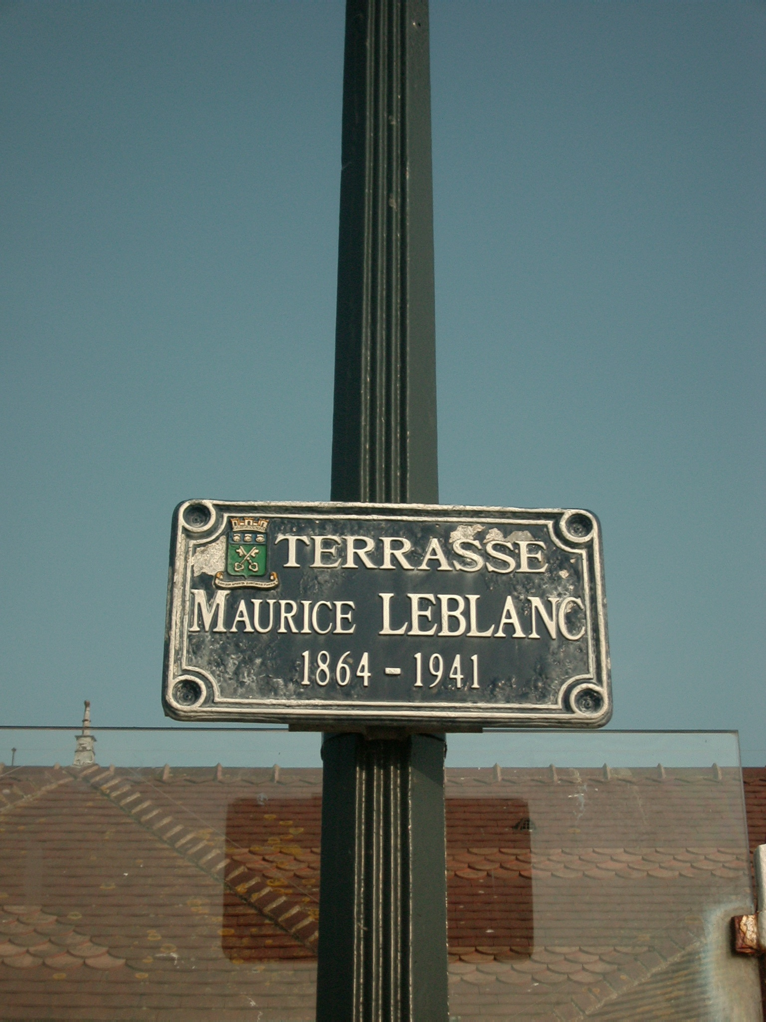 Terrasse Maurice Leblanc in Etretat Datum: 05.05.2011 Urheber: M. Pfeiffer alias Gordito1869 Quelle: privates Fotoarchiv des Urhebers